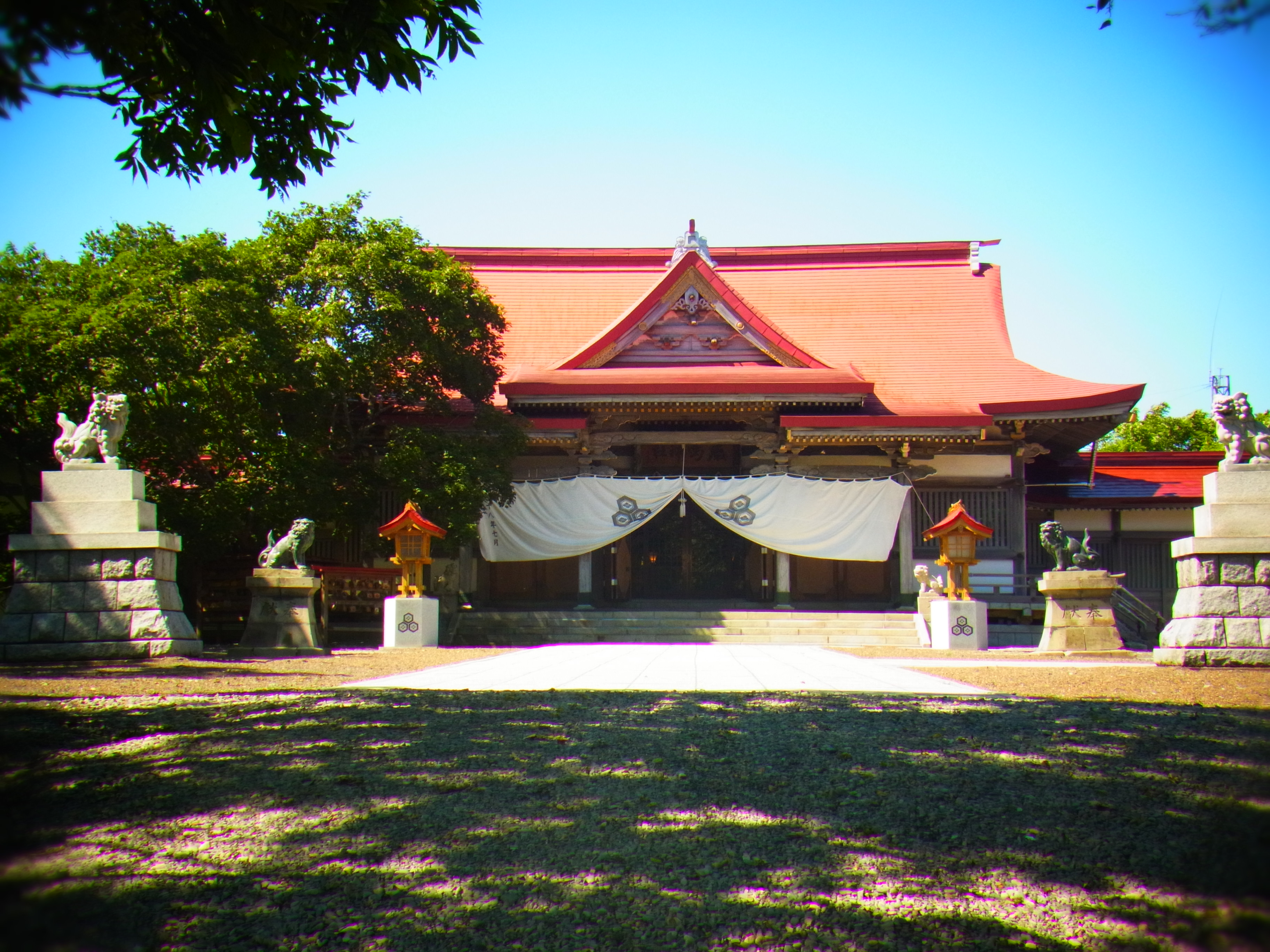 厳島神社（釧路市）の境内。